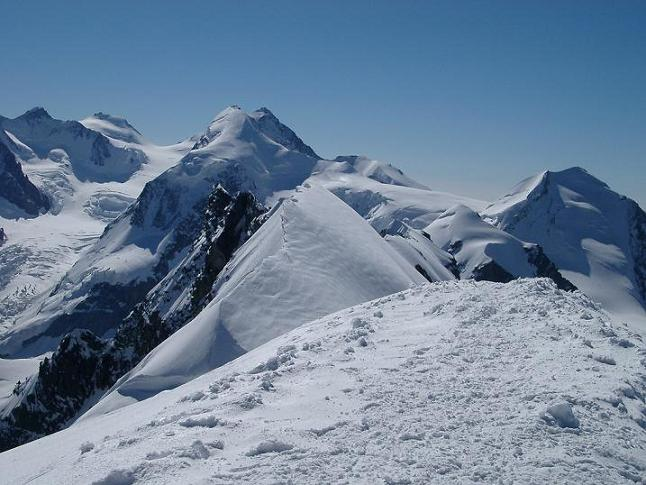 Vetta del Breithorn occidentale 4165 s.l.m